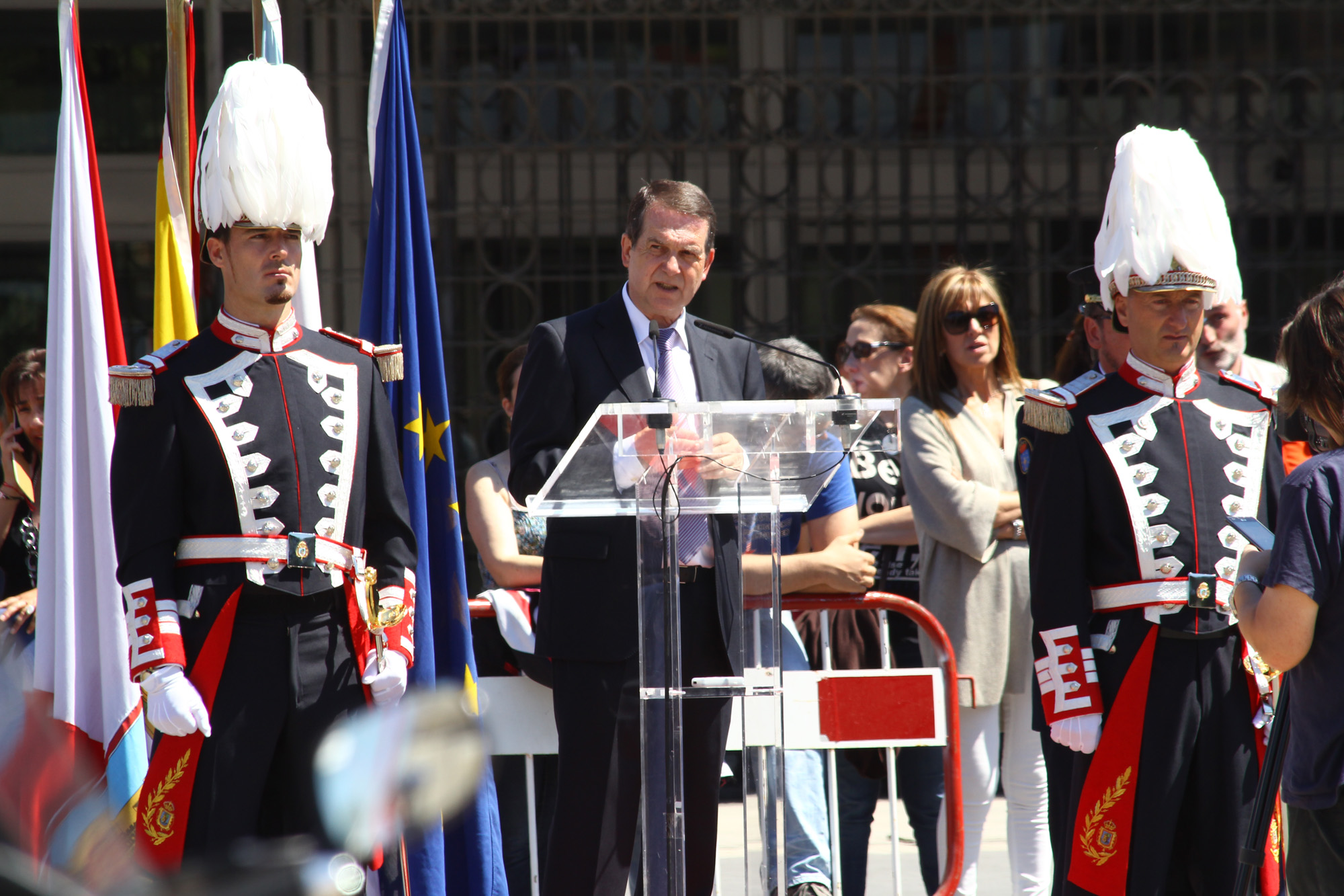 El alcalde de Vigo, Abel Caballero, dirigiéndose a los agentes de la Policía Local